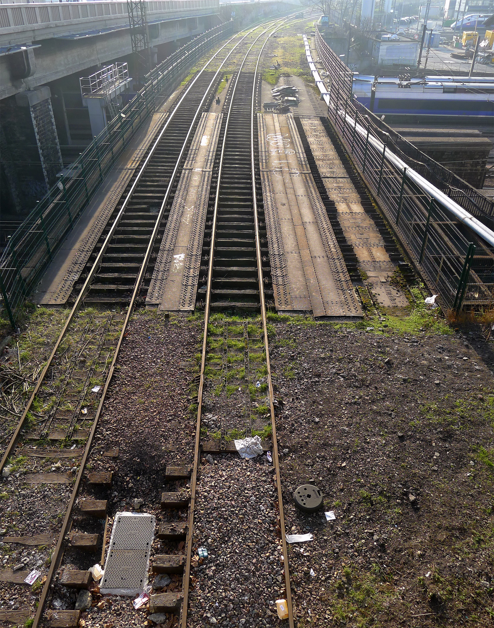 Petite Ceinture traversant les voies PLM près de la porte de Charenton - Paris XII